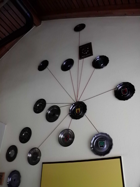 Wappen aller Gemeinden in der Samtgemeinde Salzhausen.